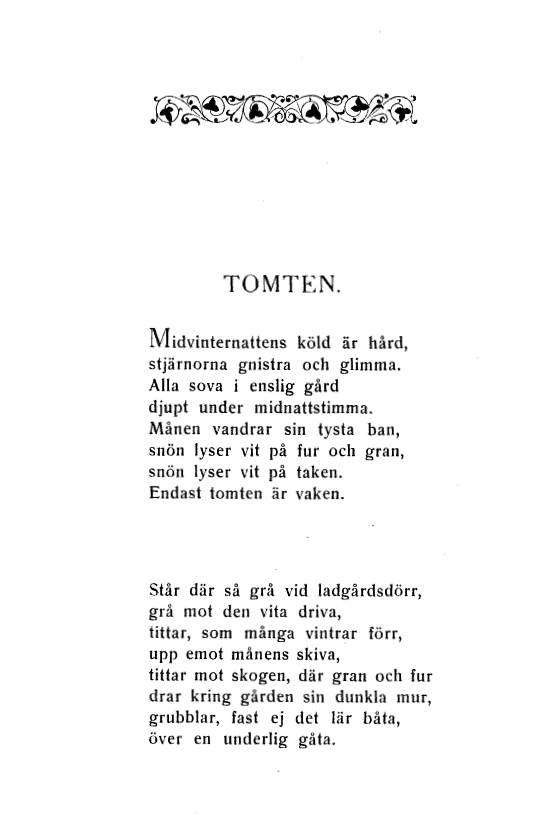 Tomten sida 1 (ur Dikter, 1914).